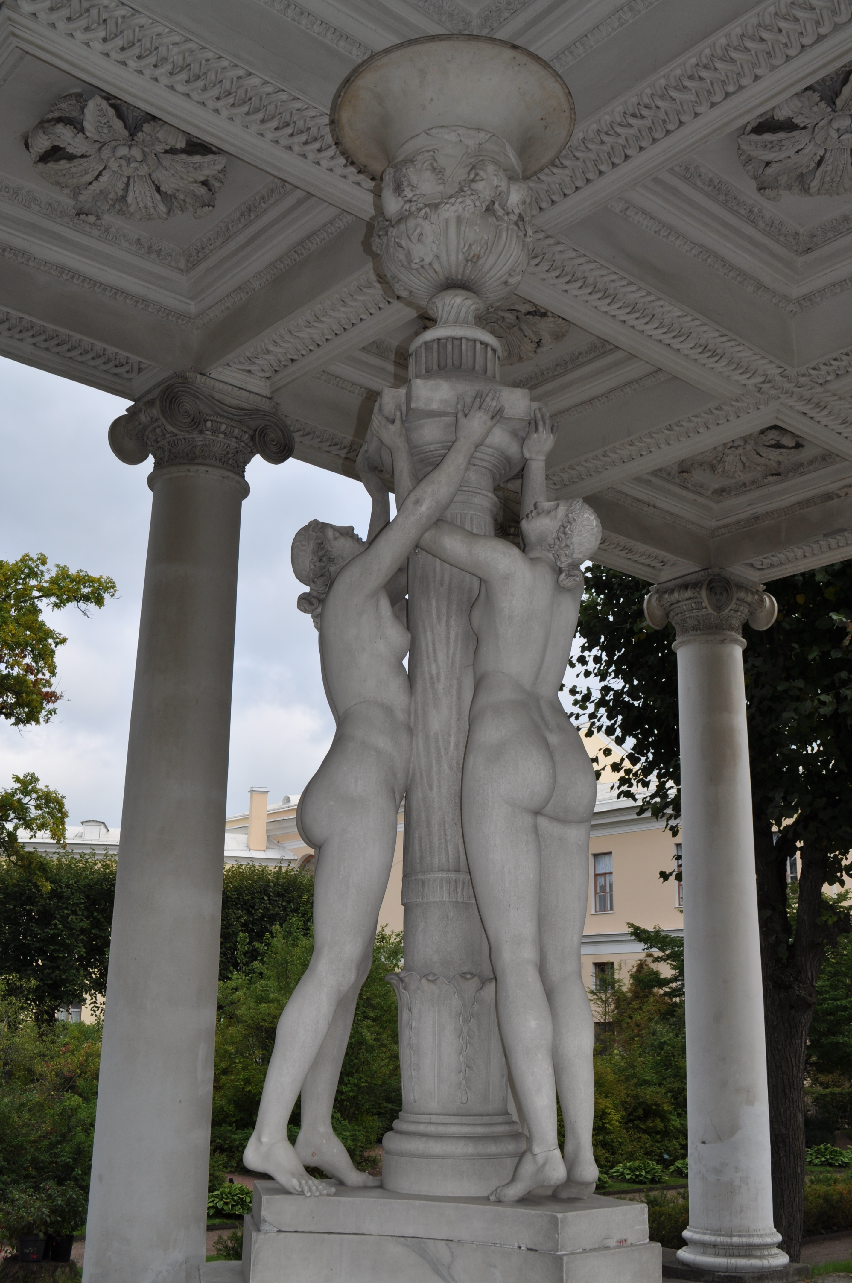 павильон трёх граций-павловск